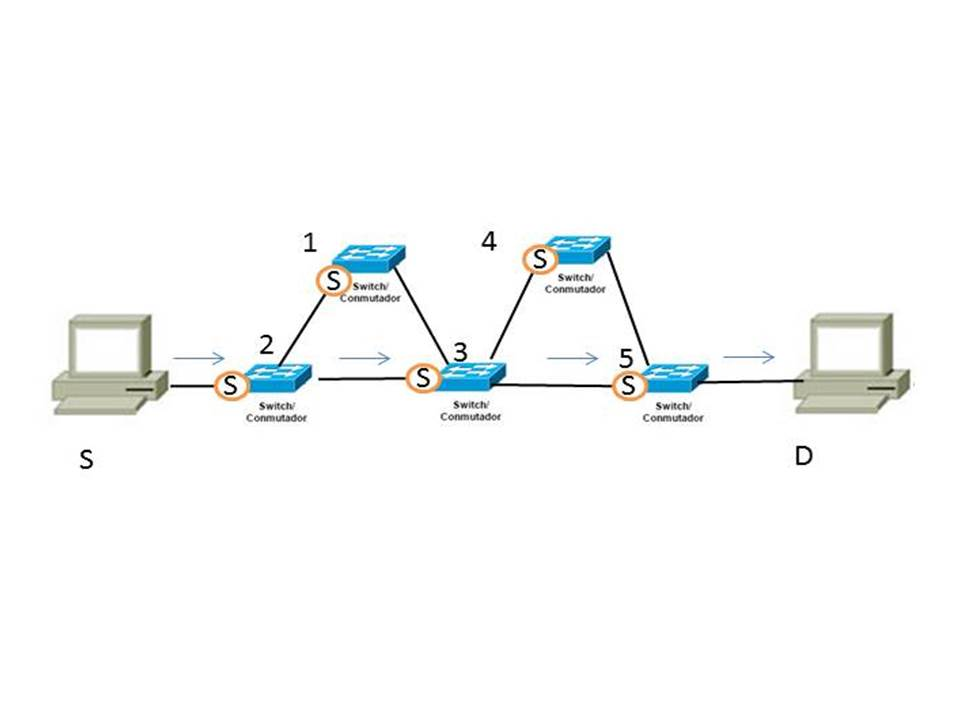 Arp Request All-Path